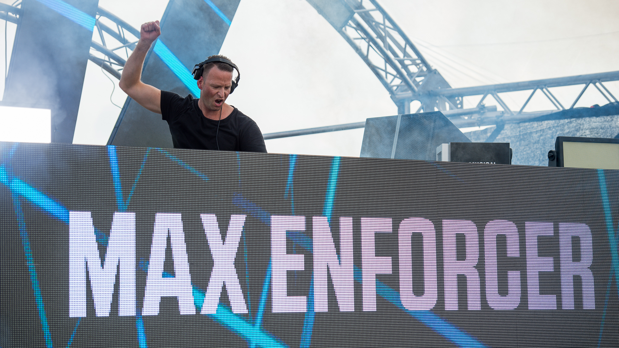 3rd Stage,Evil Activities,Festival,Kelly van Soest,Konzert,Livekonzert,Livemusik,Max Enforcer,Musik,Open Beatz 2016